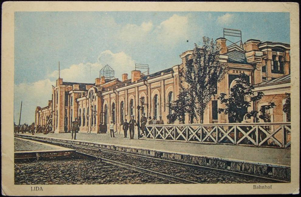 Беларуская (тарашкевіца): Ліда (Lida), вуліца Чыгуначная (vulica Čyhunačnaja). Чыгуначная станцыя